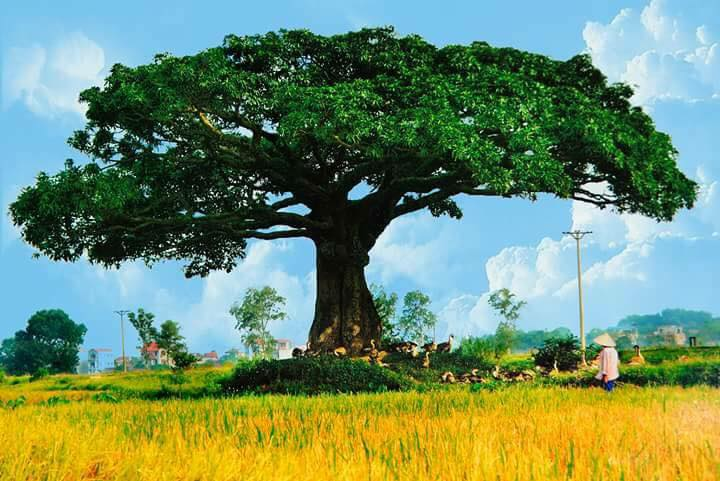 Bình Đà